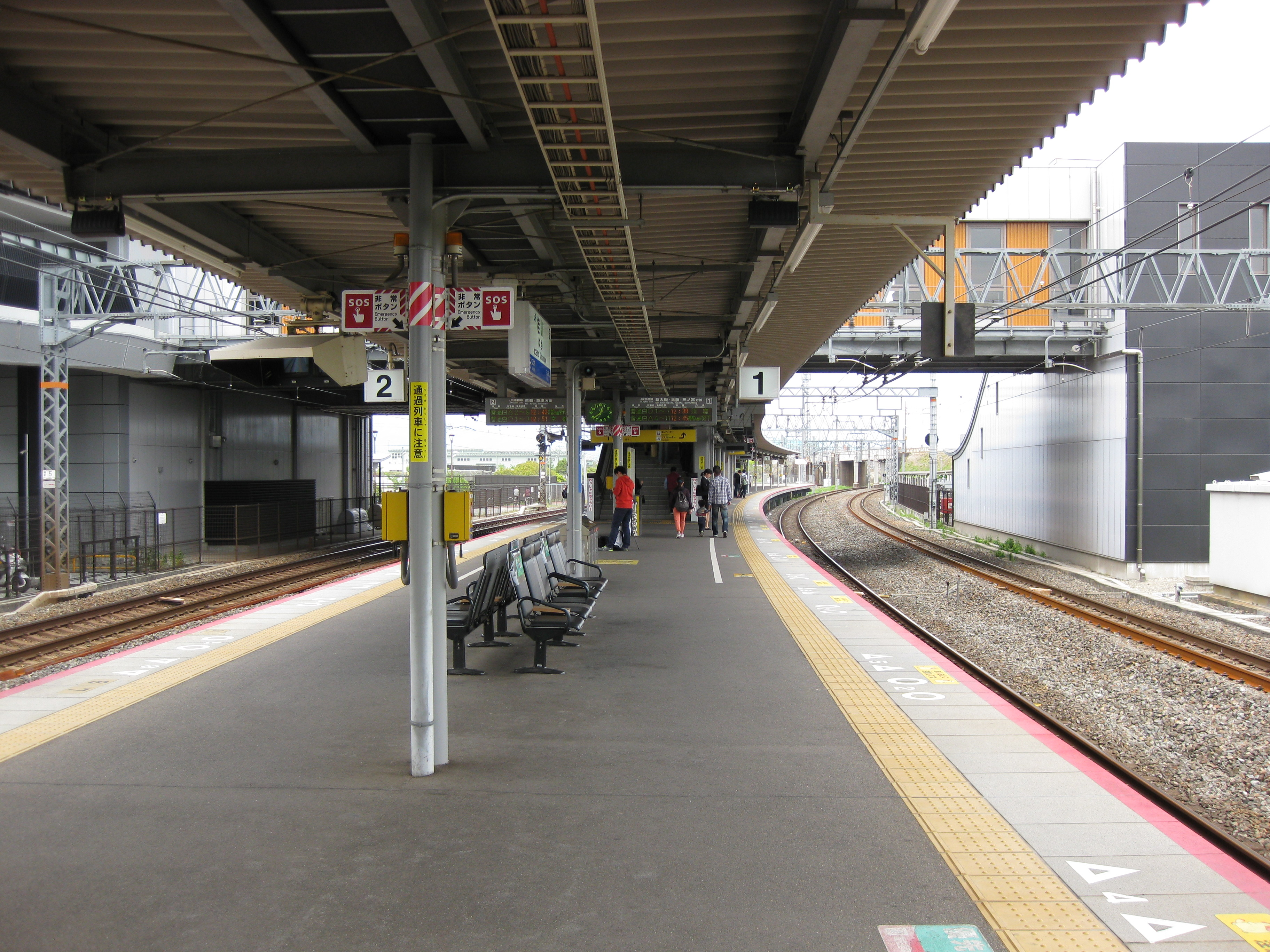 桂川駅プラットホーム